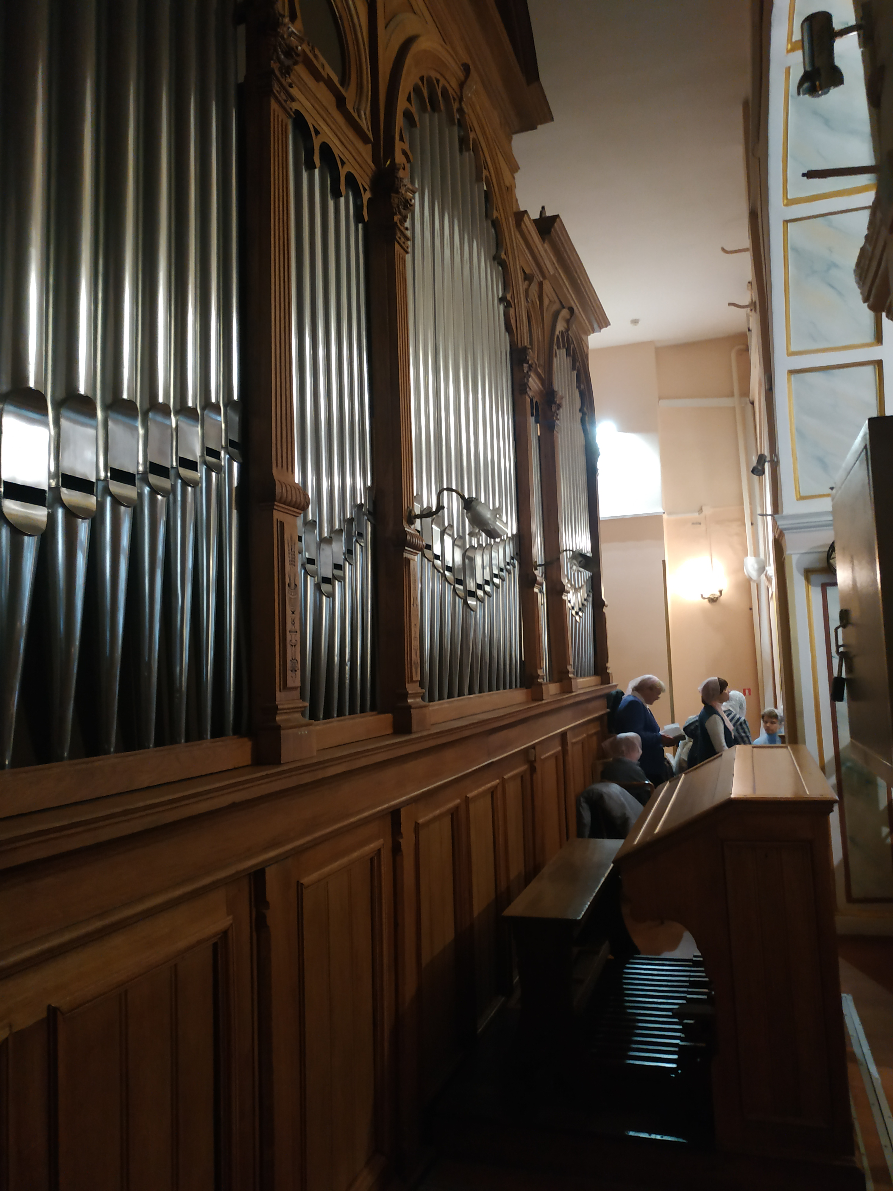 Духовой орган фирмы "Эрнст Рёвер" (38/III/P, 1898 года) в здании бывшей Евангелическо-реформатской церкви в Москве (ныне - Московская центральная церковь евангельских христиан-баптистов).